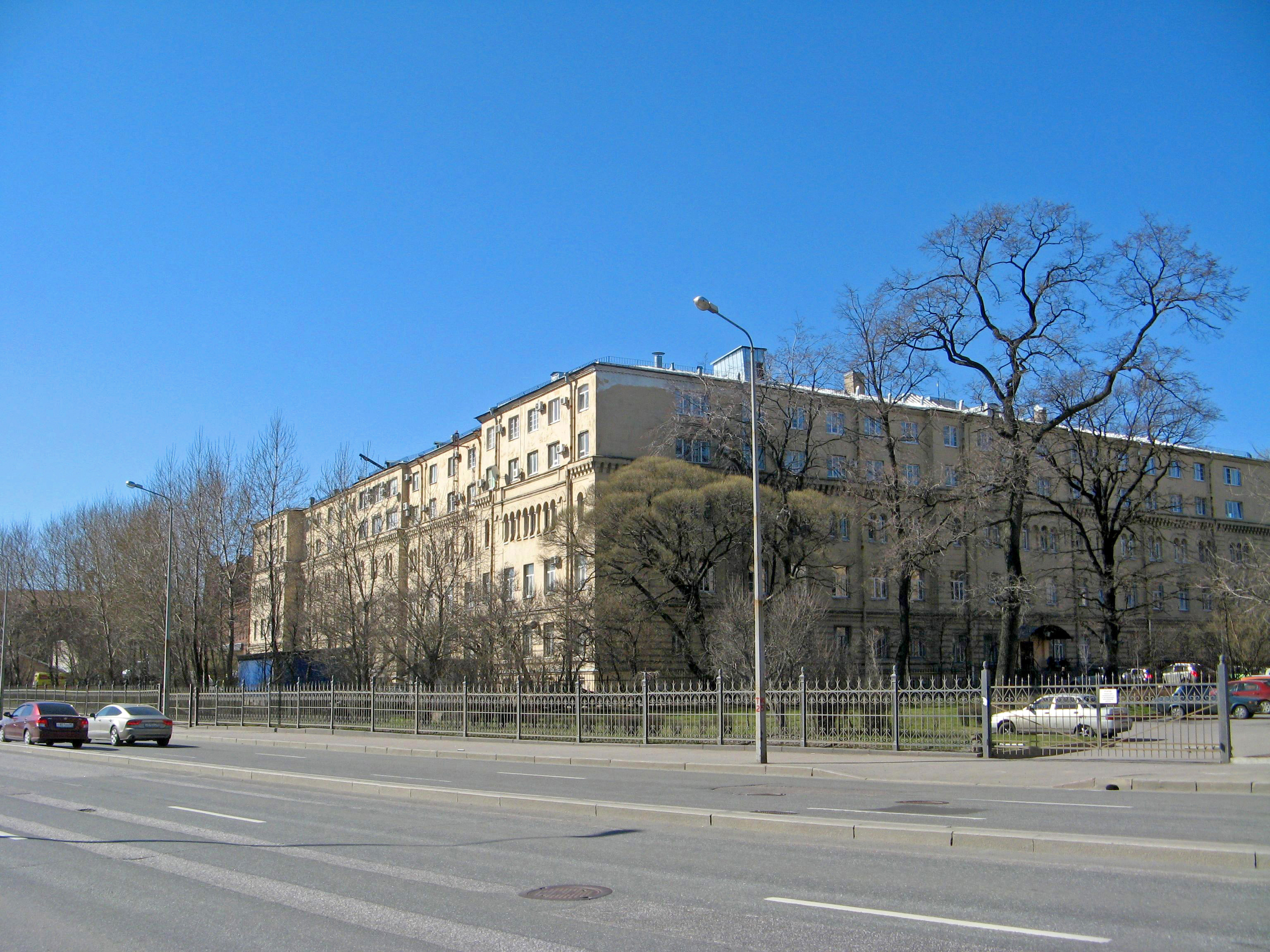 Богадельня для неимущих престарелых и увечных Санкт-Петербургского купечества и мещан со школой для сирот и детей неимущих: Арсенальная набережная, 5, улица Комсомола, 6, Калининский район, Санкт-Петербург